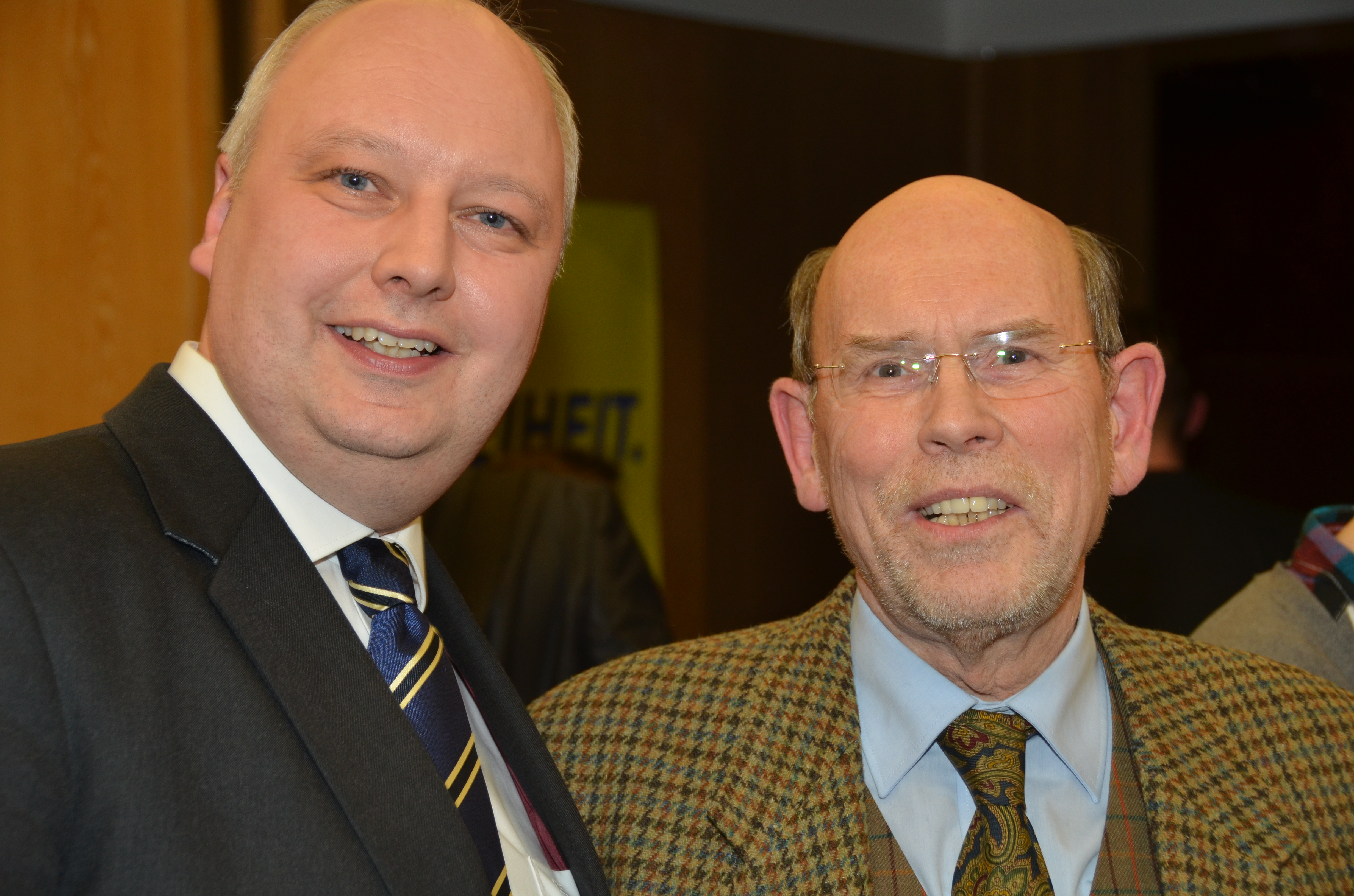 Minister Jörg Bode (links) und sein Amtsvorgänger Walter Hirche (beide FDP). Wikipedia im Landtag – Niedersachsen 20. Januar 2013 in Hannover am WahlabendDieses Bild entstand während der Landtagswahl in Niedersachsen 2013 im Landtag Hannover. This work is free and may be used by anyone for any purpose. If you wish to use this content, you do not need to request permission as long as you follow any licensing requirements mentioned on this page.